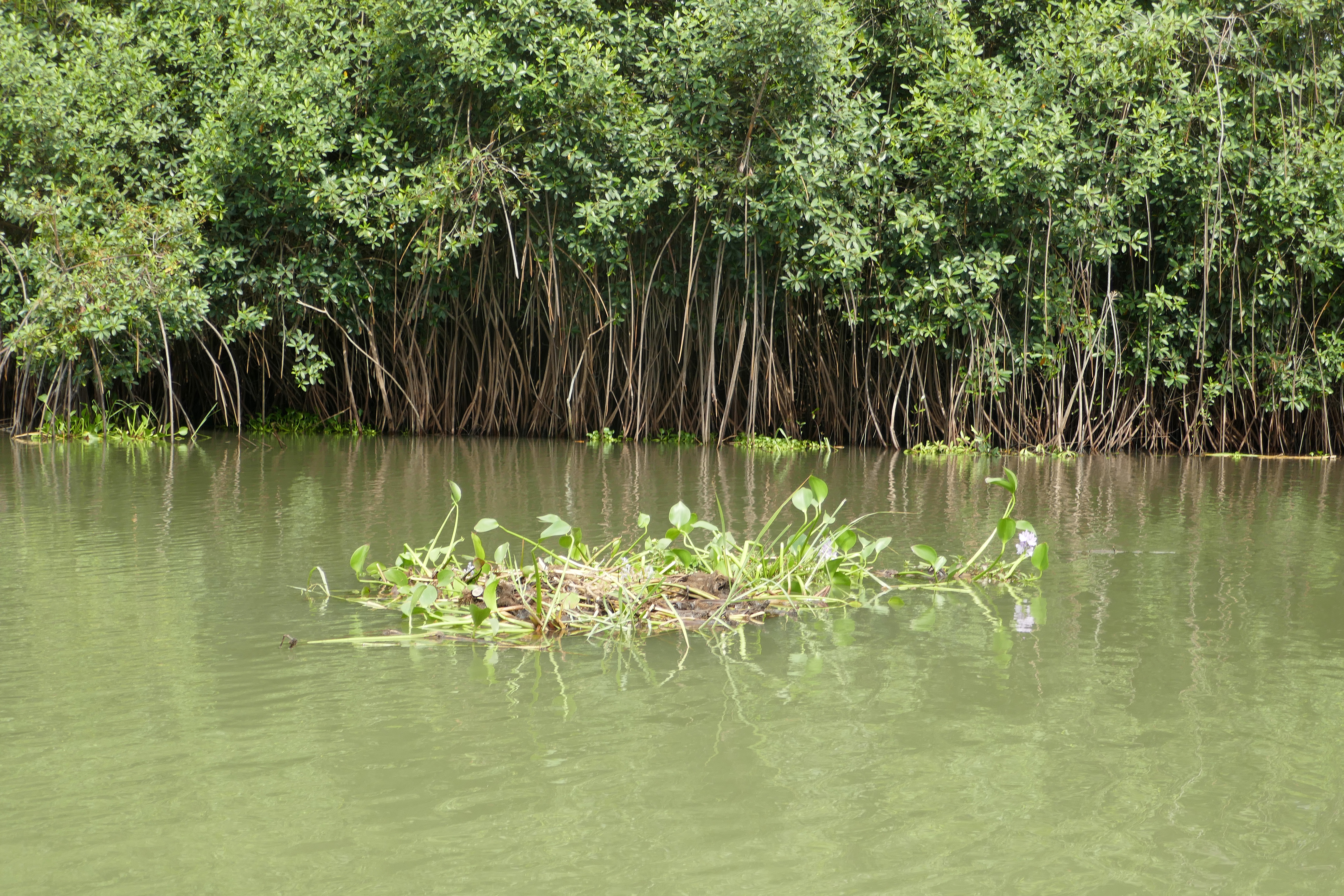 Cours du fleuve Mono au Bénin.